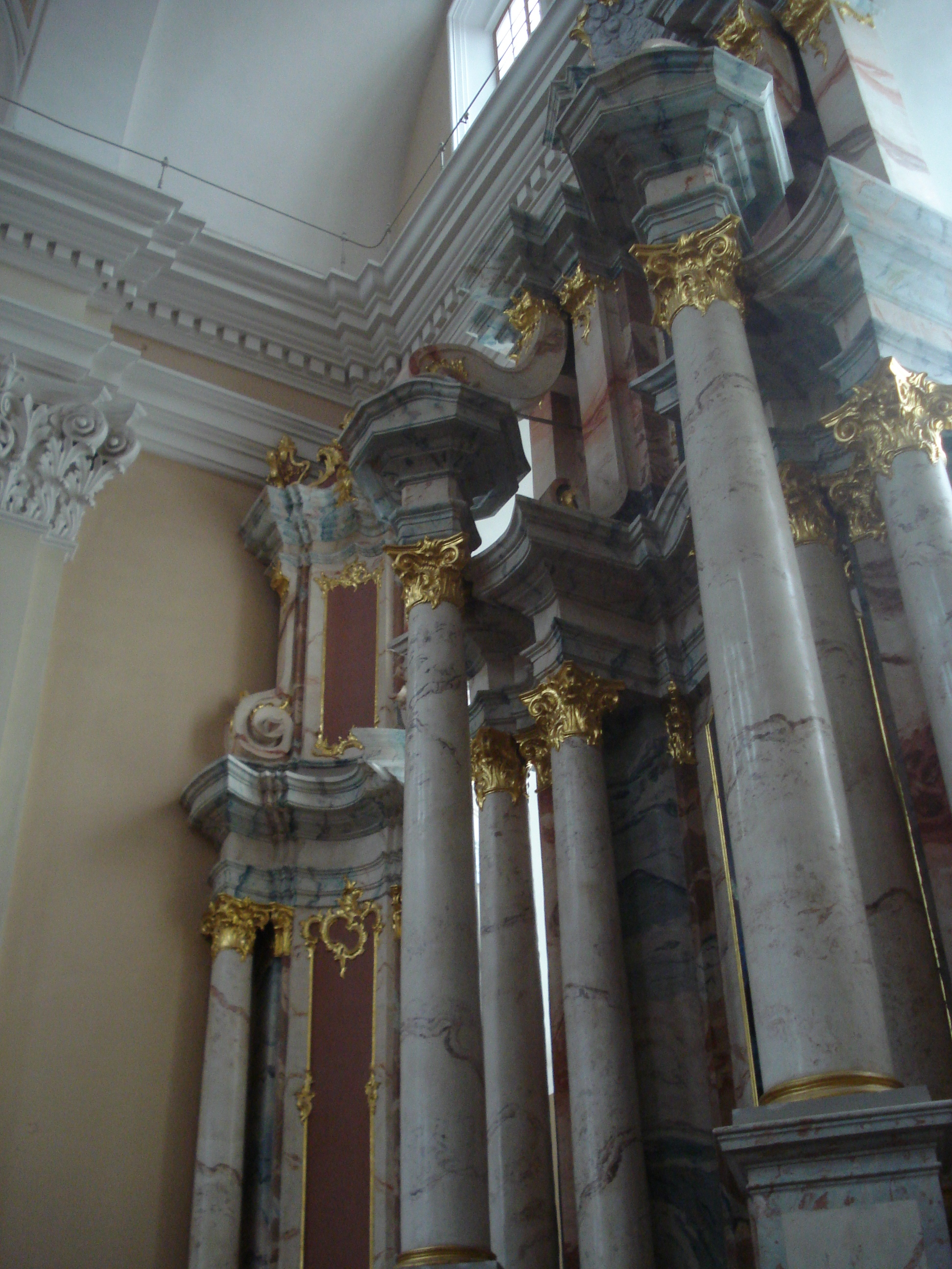 Church of St. Casimir (Šv. Kazimiero bažnyčia) in Vilnius (Didžioji g. 34). Right side altar